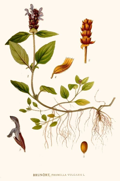 Original Description Brunört, Prunella vulgaris L.